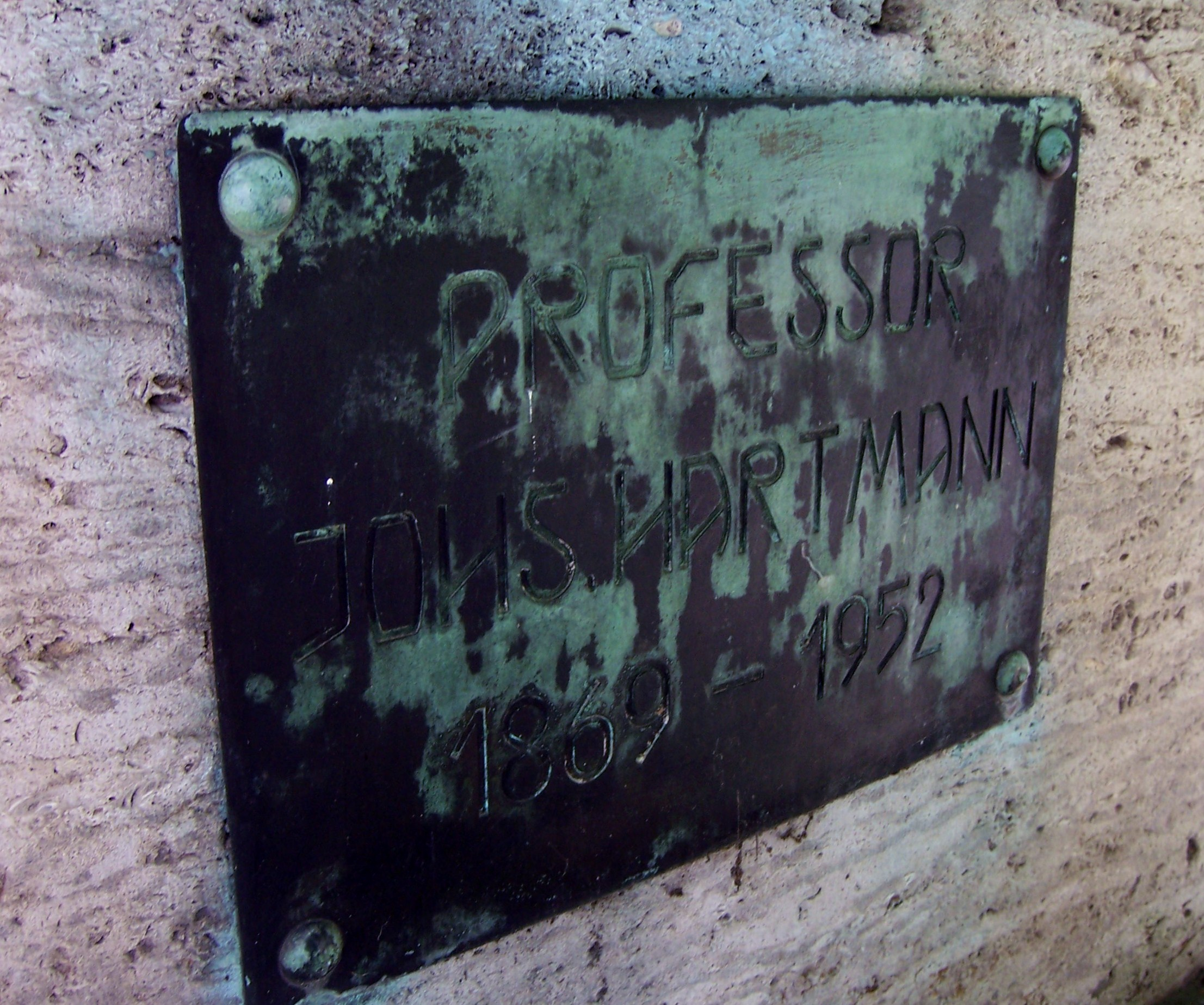 Grabplatte Johannes Hartmanns Grabstätte Max Klingers in Großjena, Rückseite des Travertinsockels